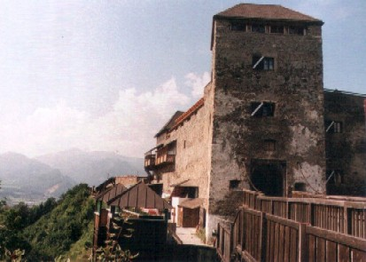 Burg Oberkapfenberg - Auf dem Bild ist der Haupteingang und die Westseite der Burg zu sehen. Die Blickrichtung ist Norden. Der Berg gleich links neben der Burg ist der Floning (1.583 m ü. A.) - Der höchste Punkt auf dem Gemeindegebiet von Kapfenberg.